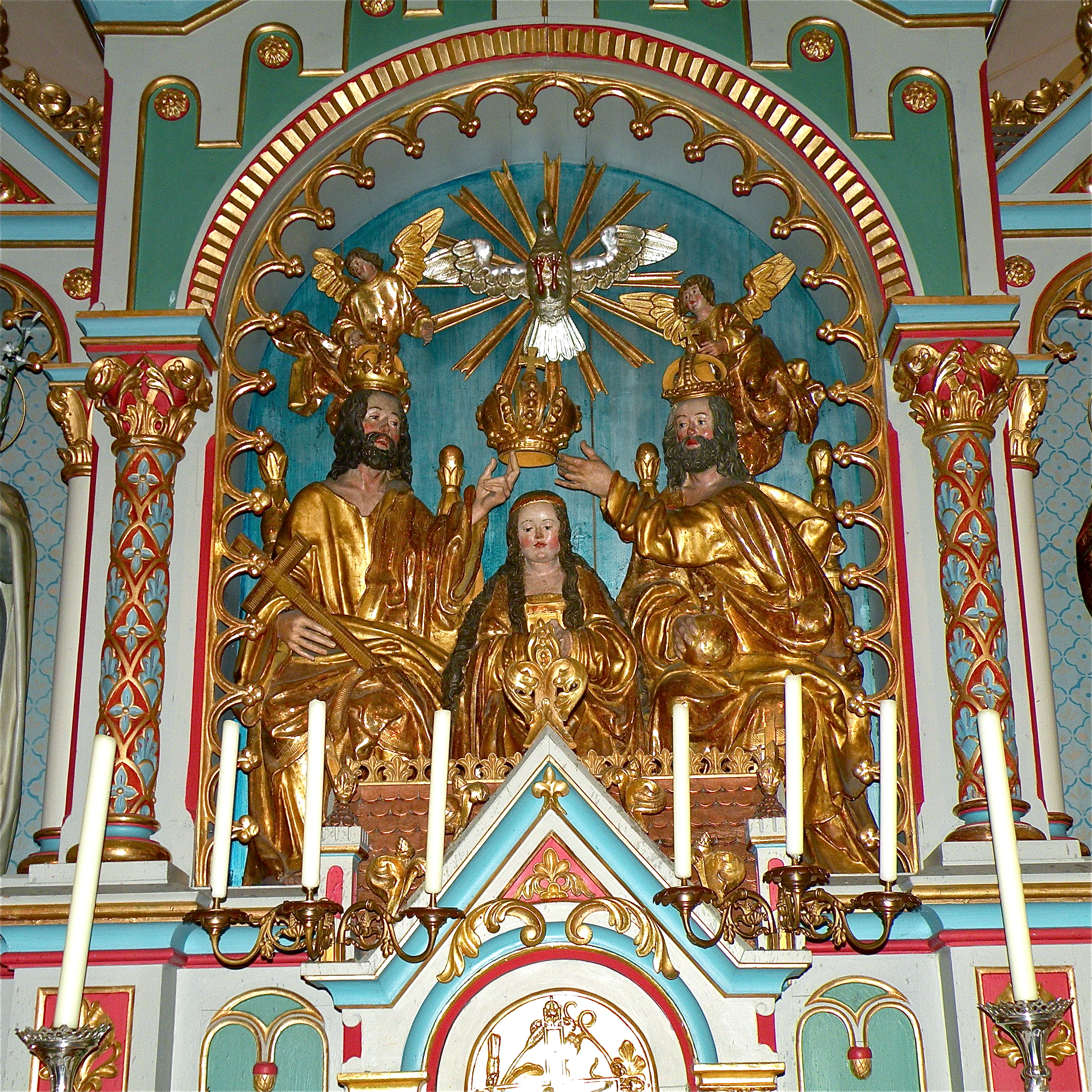 Gnadenbild Skulptur Maria Krönung am Hochaltar der Wallfahrtskirche Maria Laab in der Marktgemeinde Naarn im Bezirk Perg in Oberösterreich